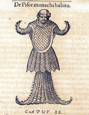 De pisce monachi habitu (Mauro Mariani, Gesner medici Tigurini Historiae animalium liber 4. 1558 pag 492. Monografia presso Biblioteca Acquario Civico (fondo speciale) E' rapprasentato, fantasiosamente un pesce in veste di monaco. Licenza di pubblico dominio